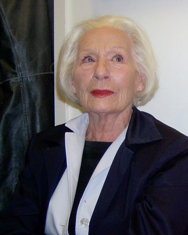 Bildbeschreibung: Die Schauspielerin Inge Keller während einer Ausstellungseröffnung in Berlin-Mitte, Oktober 2006 photo taken by User:SpreeTom (own work) date / Datum: 06.10.2006